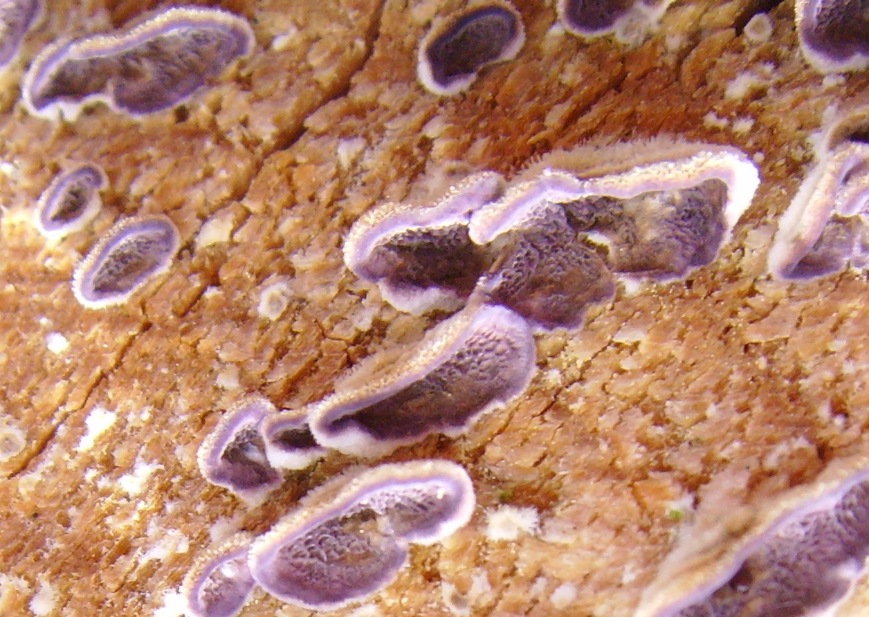 Groupe de Trichaptum abietinum sur un pin abattu (la Villeneuve, Séné, Morbihan, Bretagne, France)